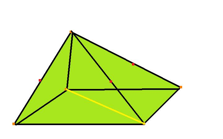 Diagrama de una Piramide.